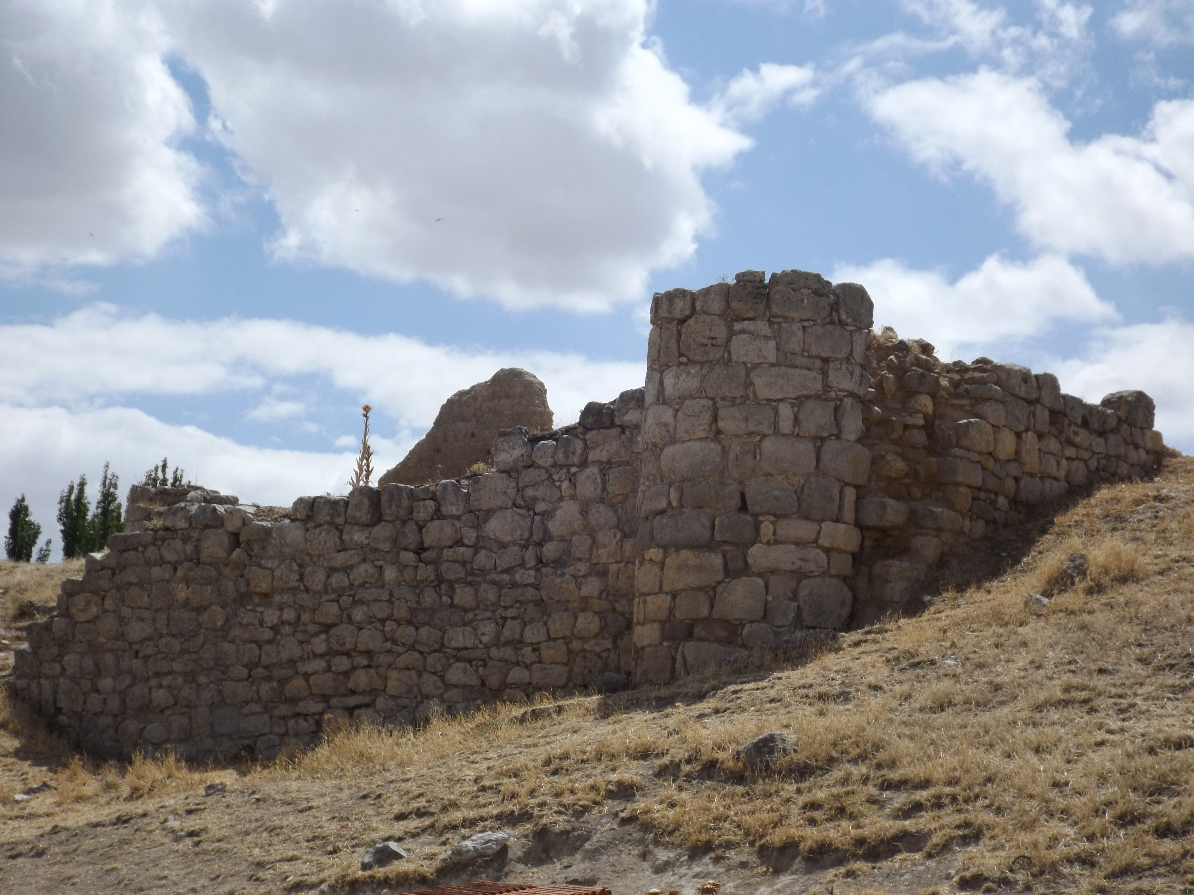 Restos del castillo de San Martín de Valvení (agosto 2015).